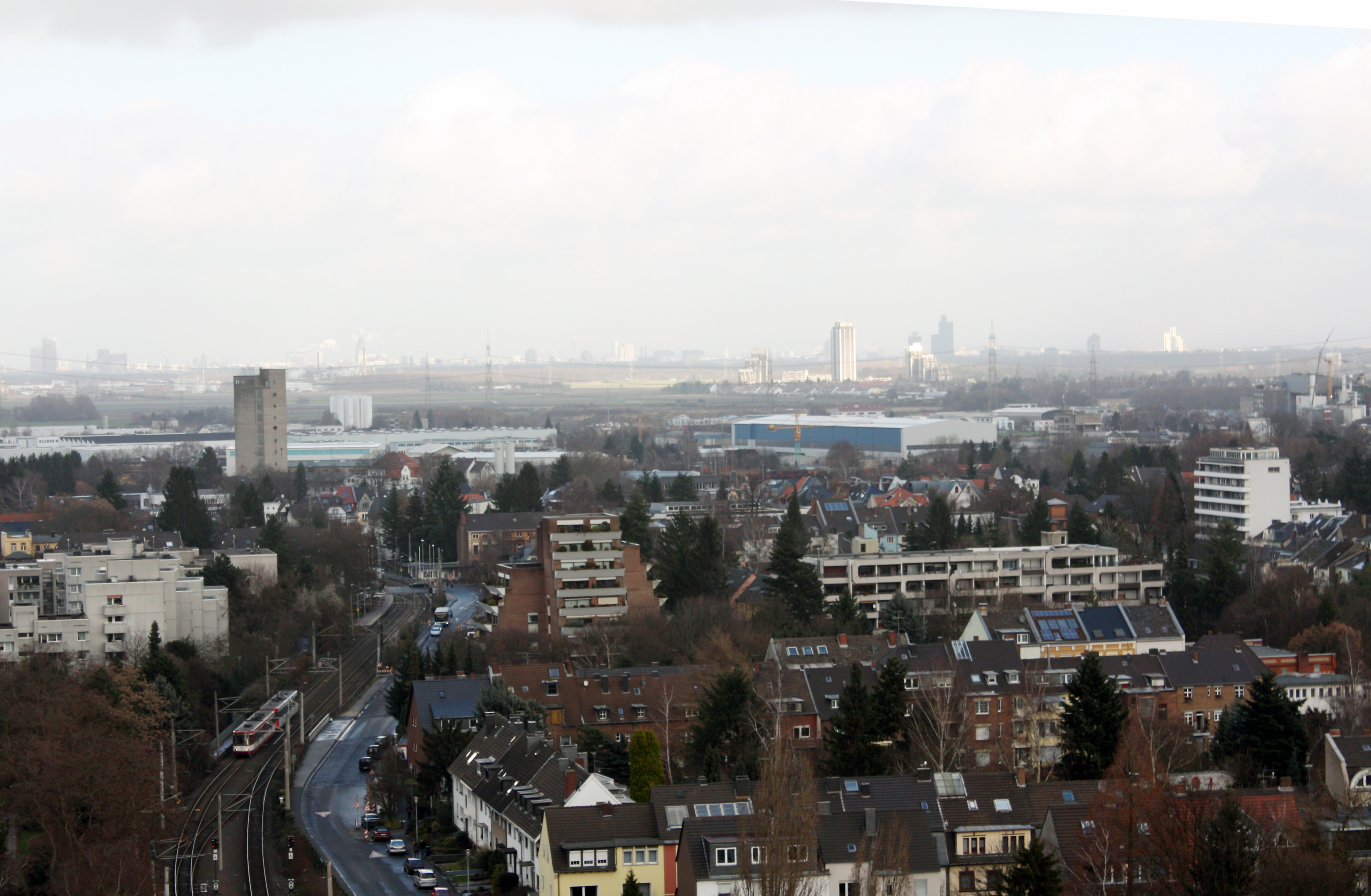 Brühl-Nord, Station und Trasse der Linie 18